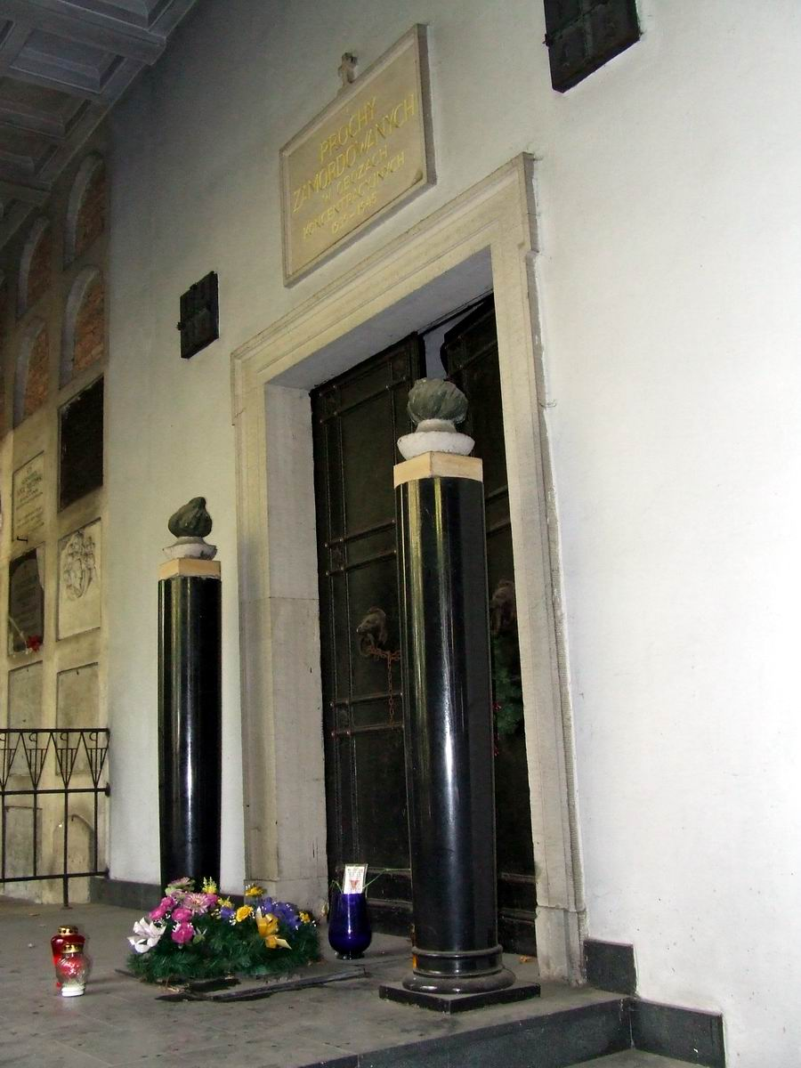 Katakumby z prochami pomordowanych w obozach koncentracyjnych, Stare Powązki